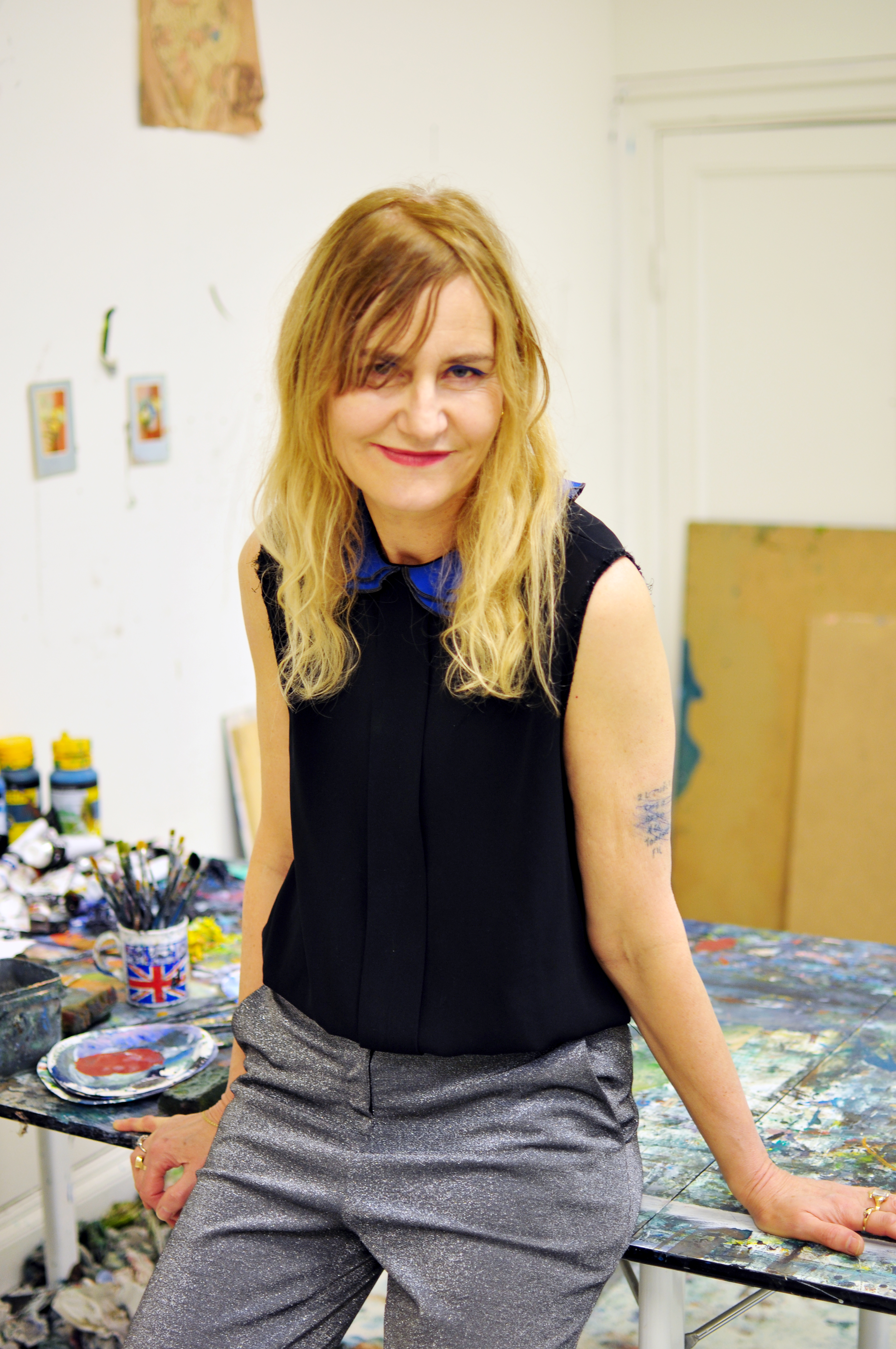 Konstnären Helene Billgren.